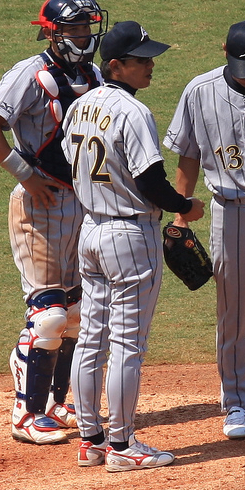 Yutaka Ohno